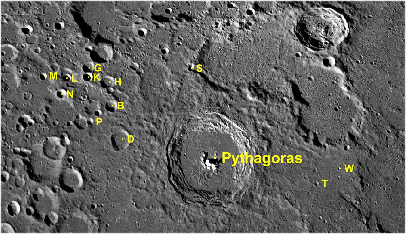 Cráter lunar Pythagoras. Cráteres satélite. (Imagen LRO)